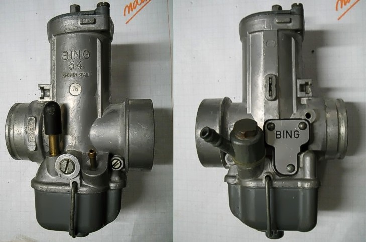 carburatore Bing 54, da 36 mm